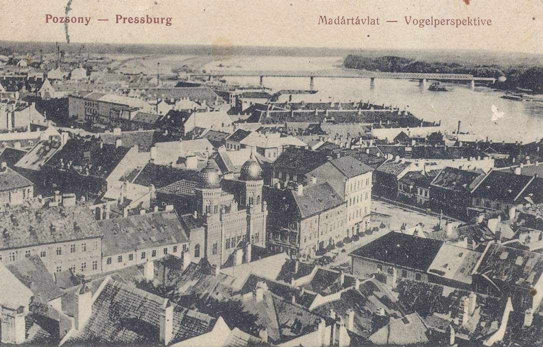 Neologická synagóga v Bratislave na Rybnom námestí